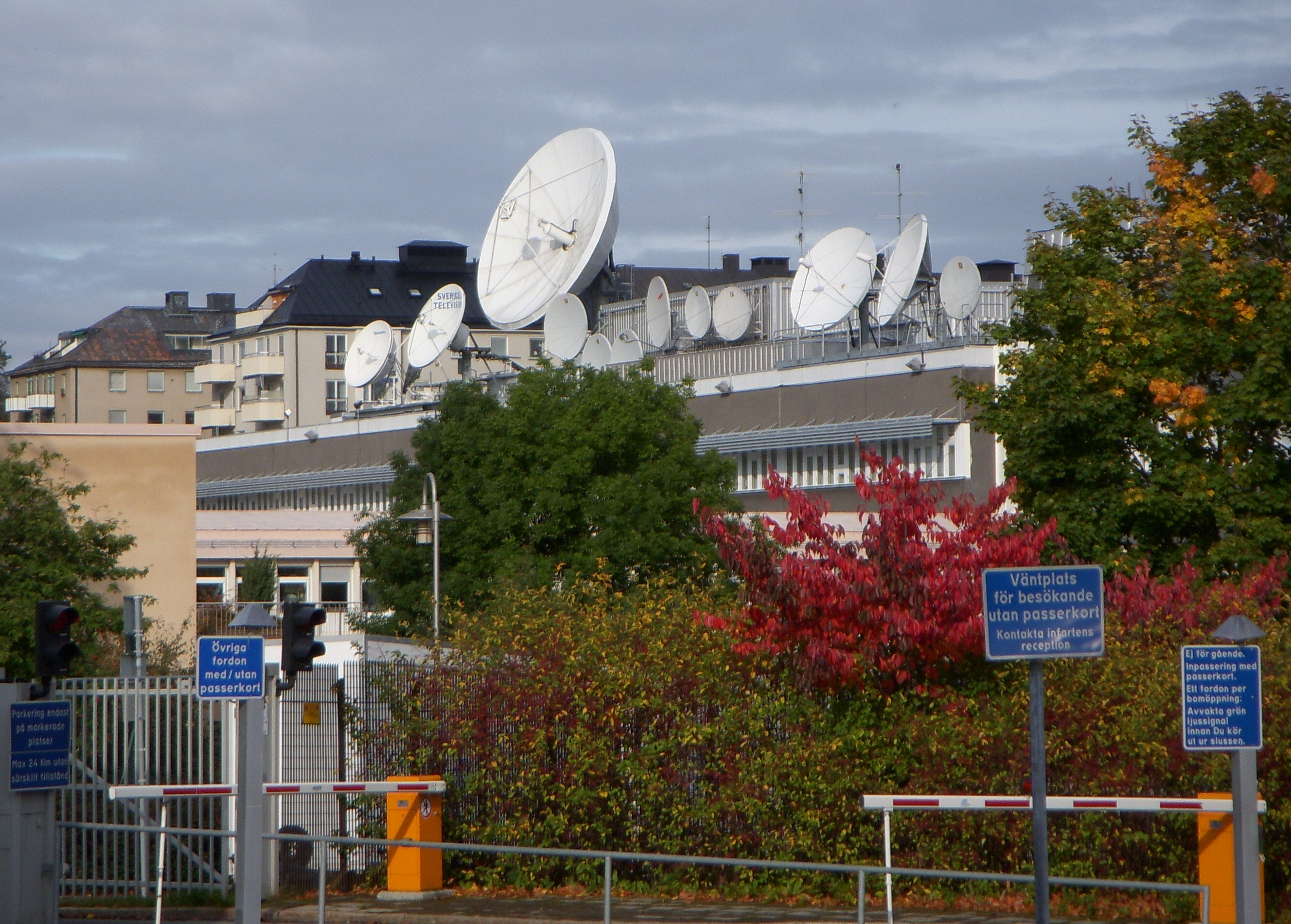 Sveriges Television i Stockholm, antenner